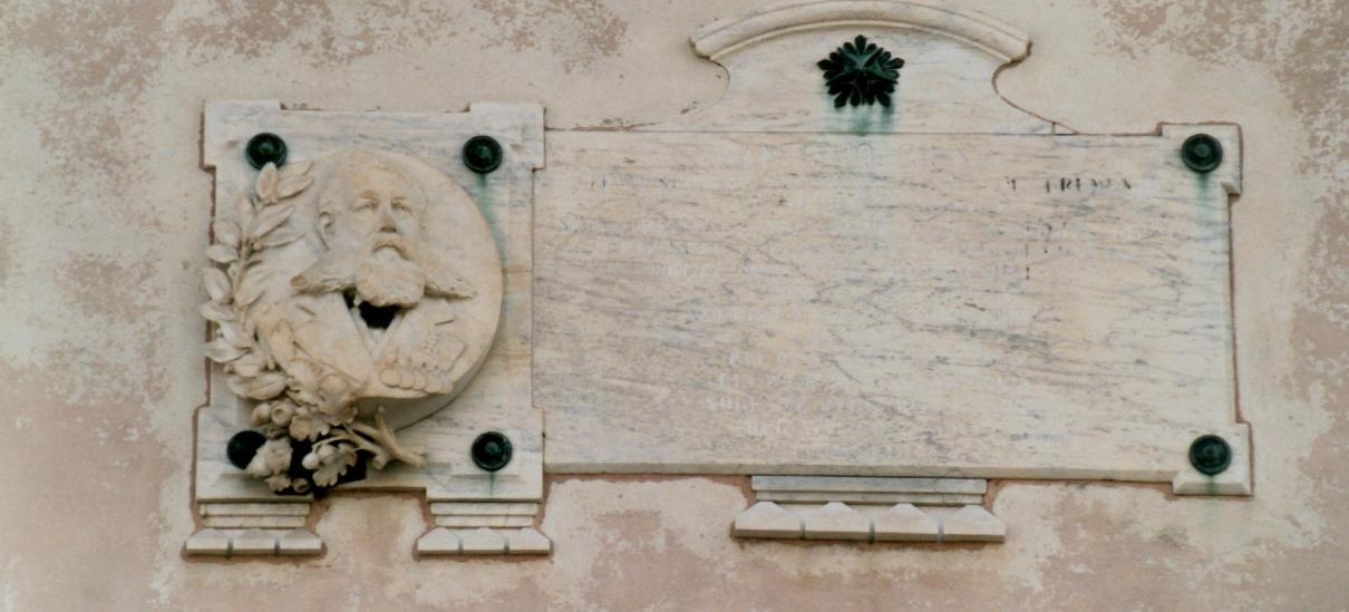 Spadafora - Lapide con epigrafe del Dottor Antonino Giunta.